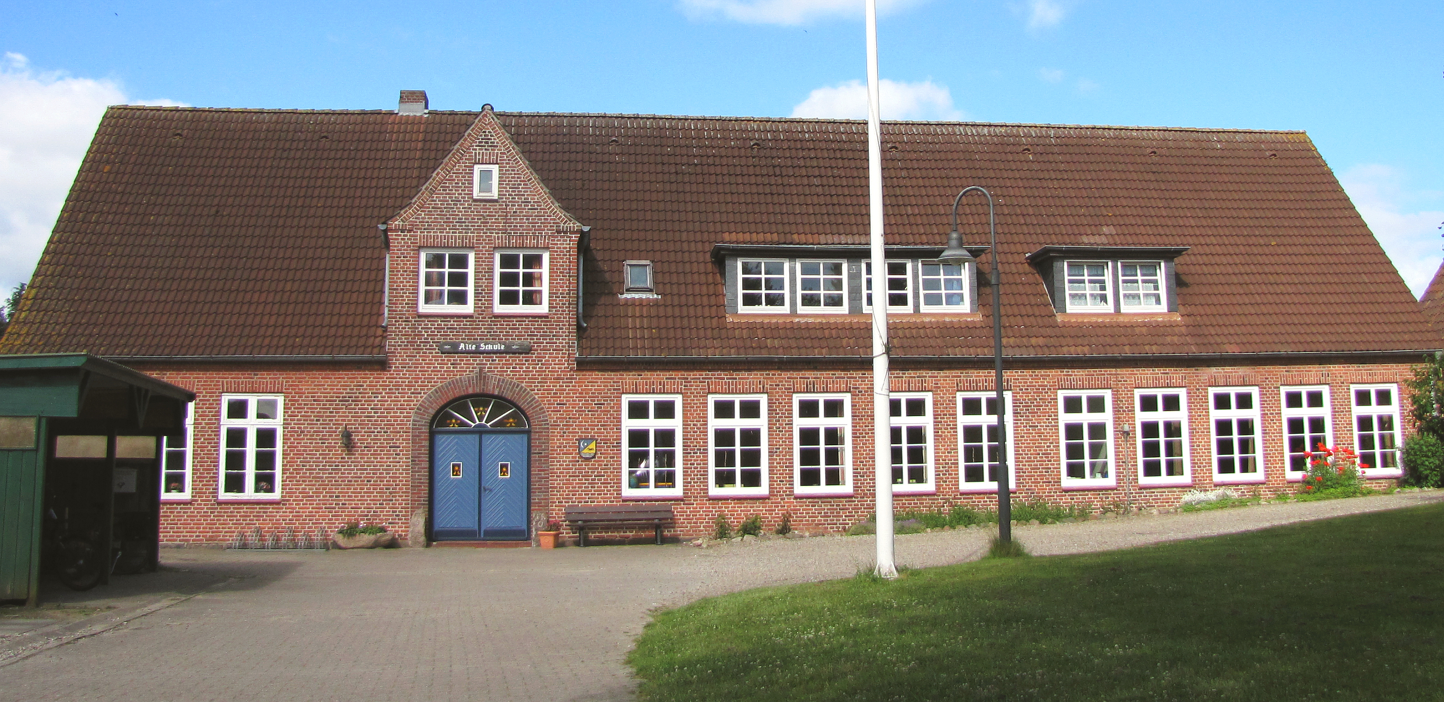 Bürgerhaus der Gemeinde Steinberg Kreis Schleswig-Flensburg - Foto 2012 Wolfgang Pehlemann IMG_7387